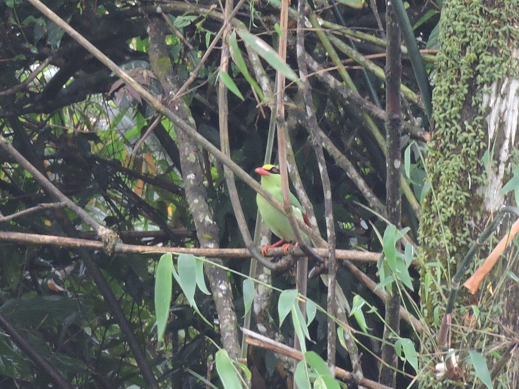 นกสาลิกาเขียว Common Green Magpie